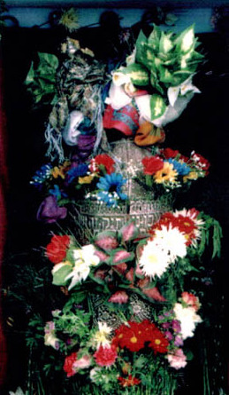 the ancient torah scroll of the abbo family ספר התורה המסורתי בארון הקודש בבית עבו